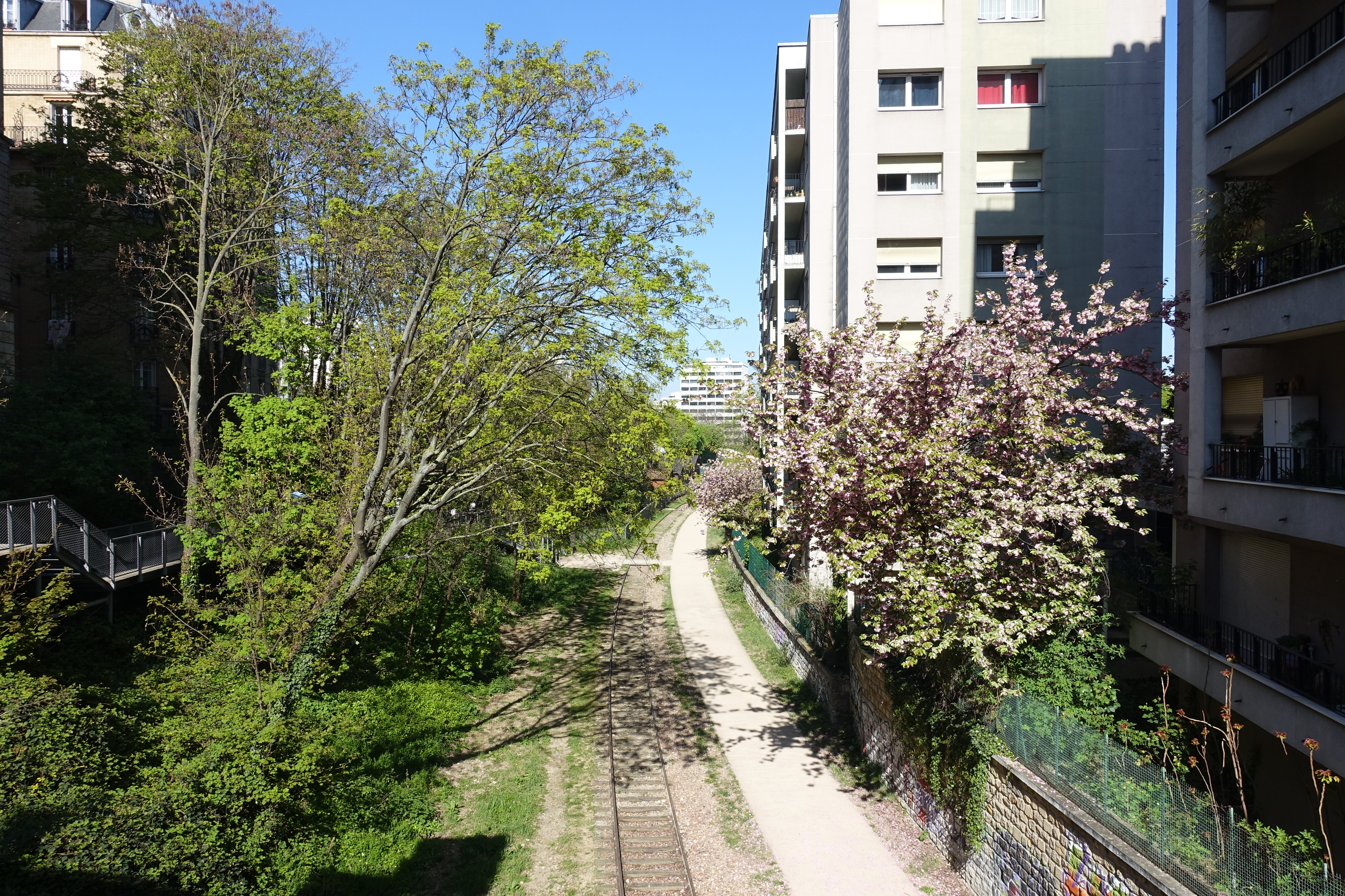 Cherry blossoms @ Petite Ceinture du 15eme @ Paris